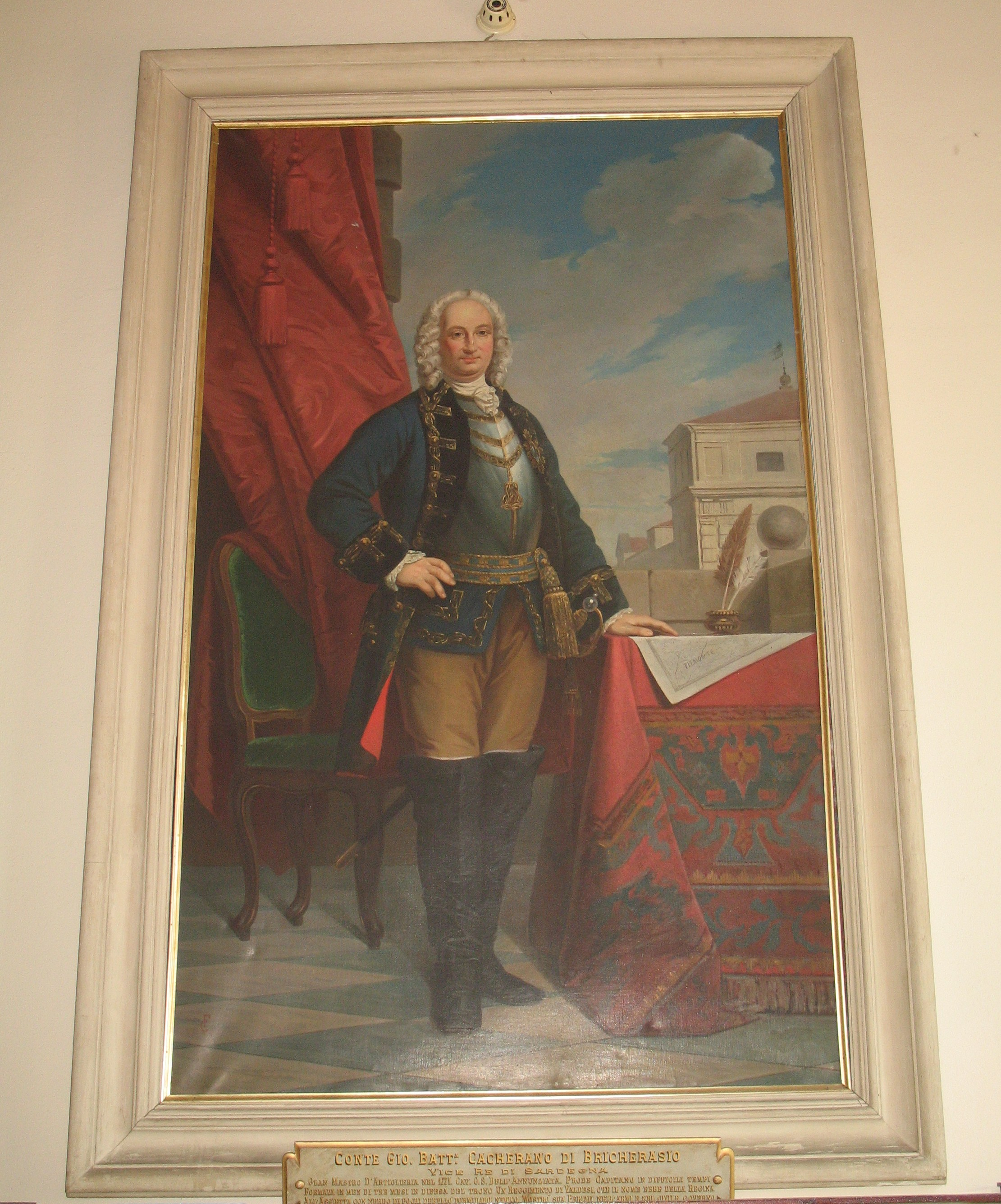 Dipinto del XVIII secolo raffigurante Giovanni Battista Cacherano Conte di Bricherasio, Maestro d'Artiglieria e Viceré di Sardegna dal 3 settembre 1751 al 25 aprile 1755. Palazzo Bricherasio di Fubine (Alessandria, Italia).